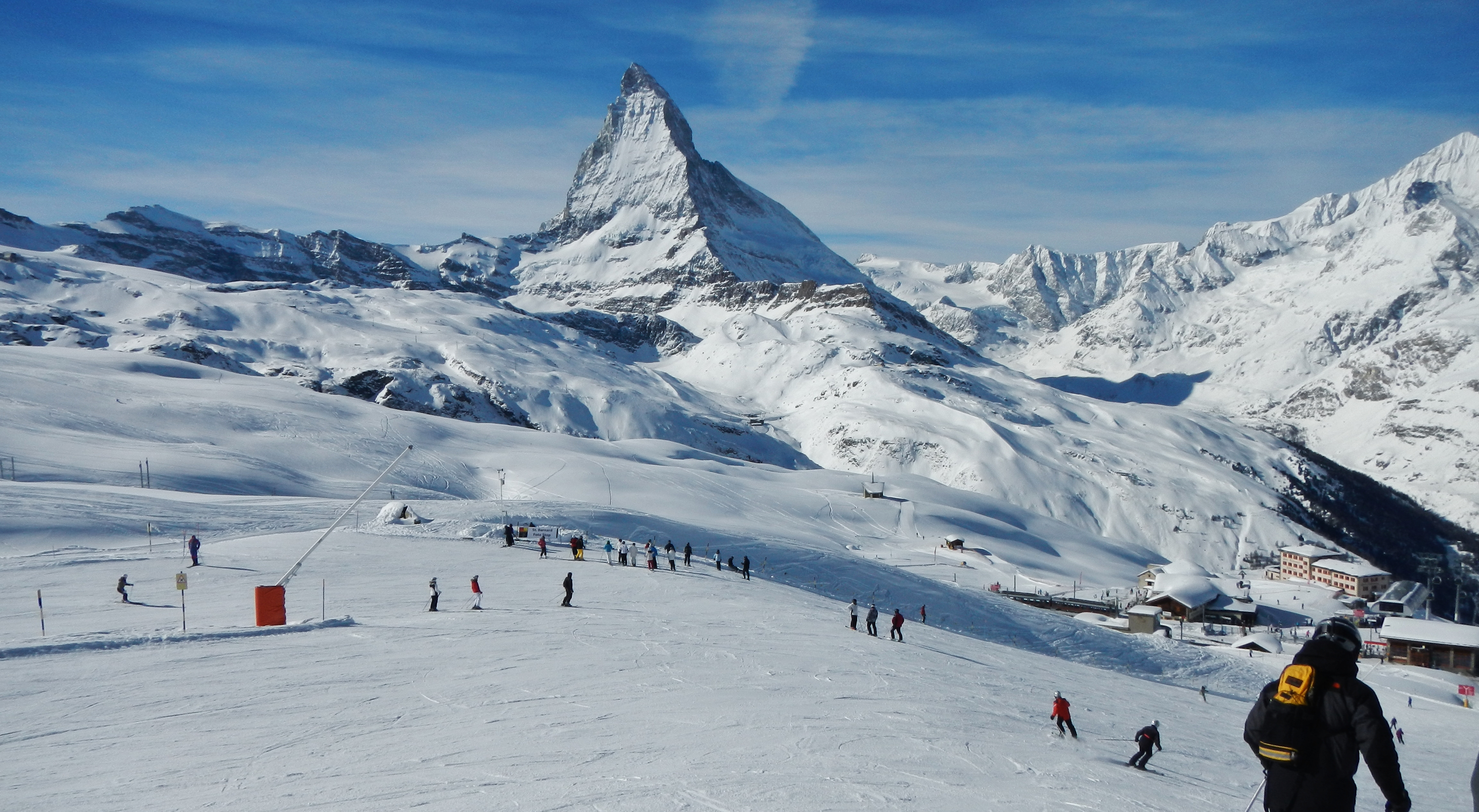 Matterhorn Cervino 4478 m from ski run from Gornergrat 3089 m to Riffelberg 2582 m